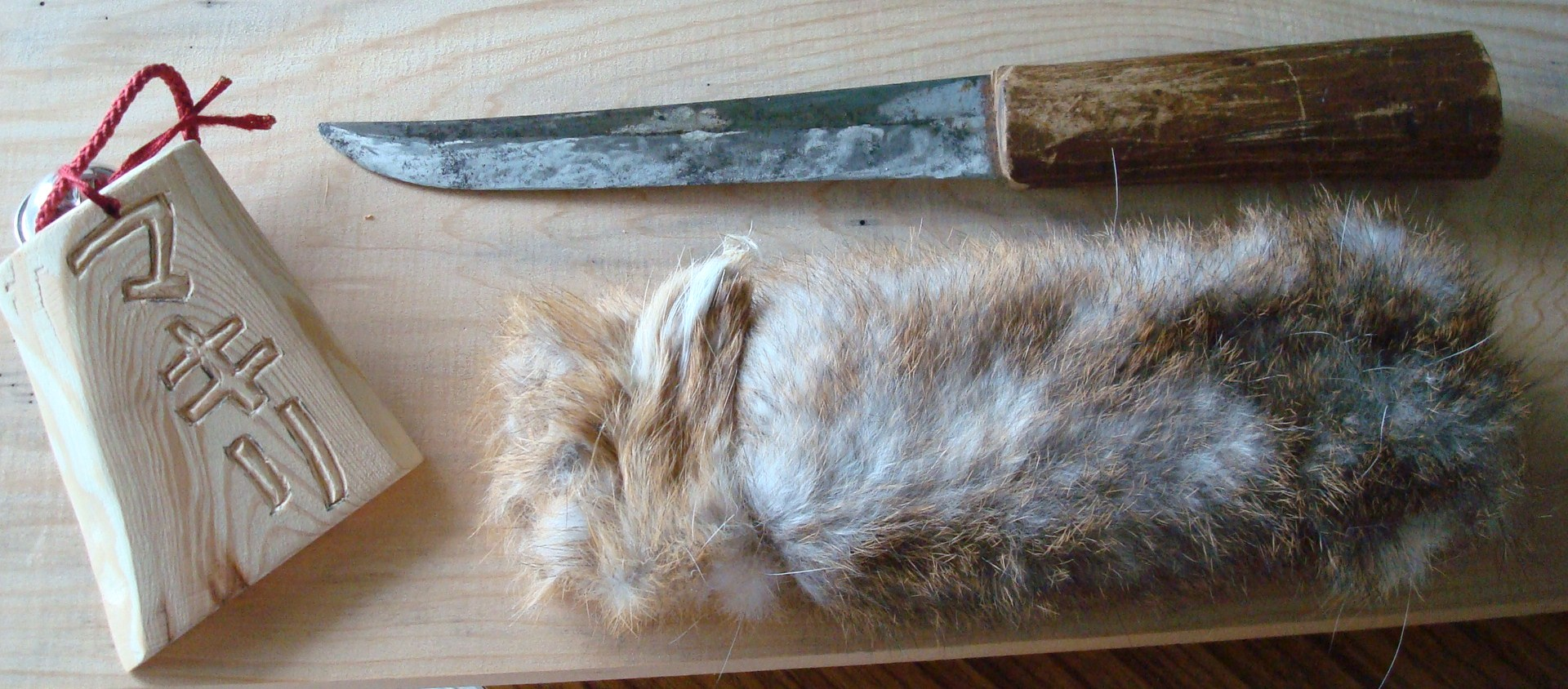 八木沢マタギ狩猟用具 有形民俗文化財 第一号 上小阿仁村教育委員会 指定